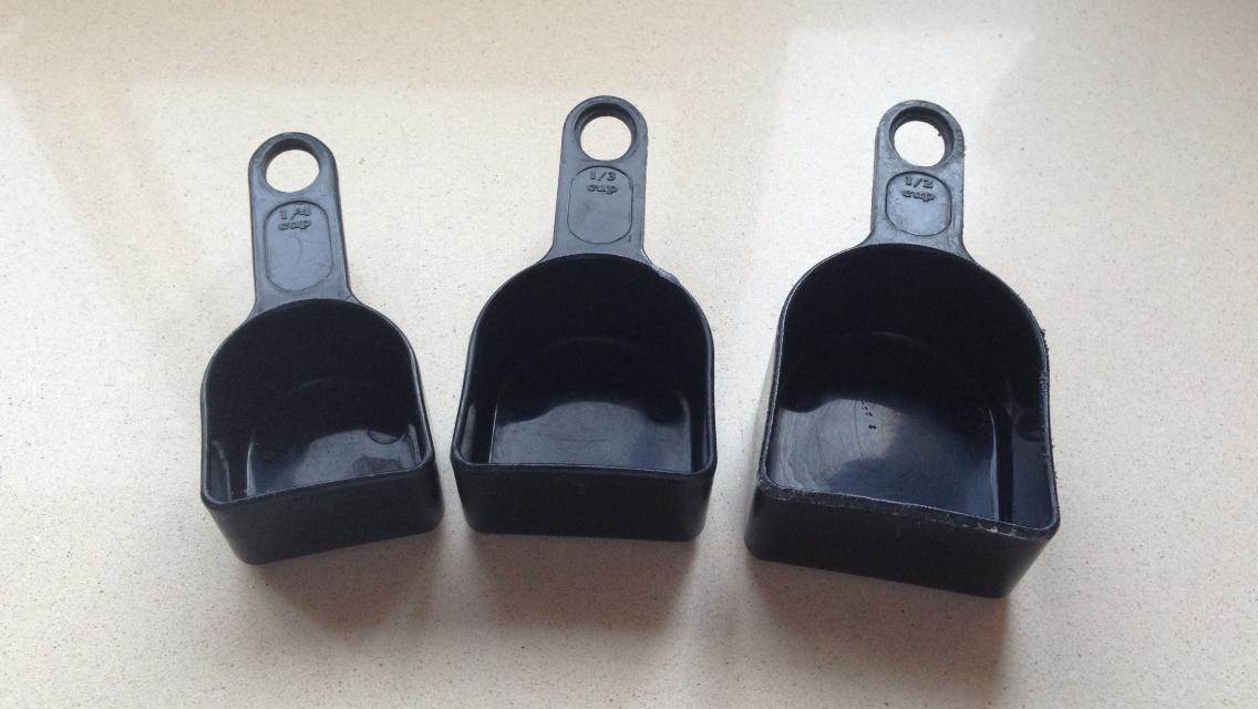 כפות מדידה בגדלים שונים.